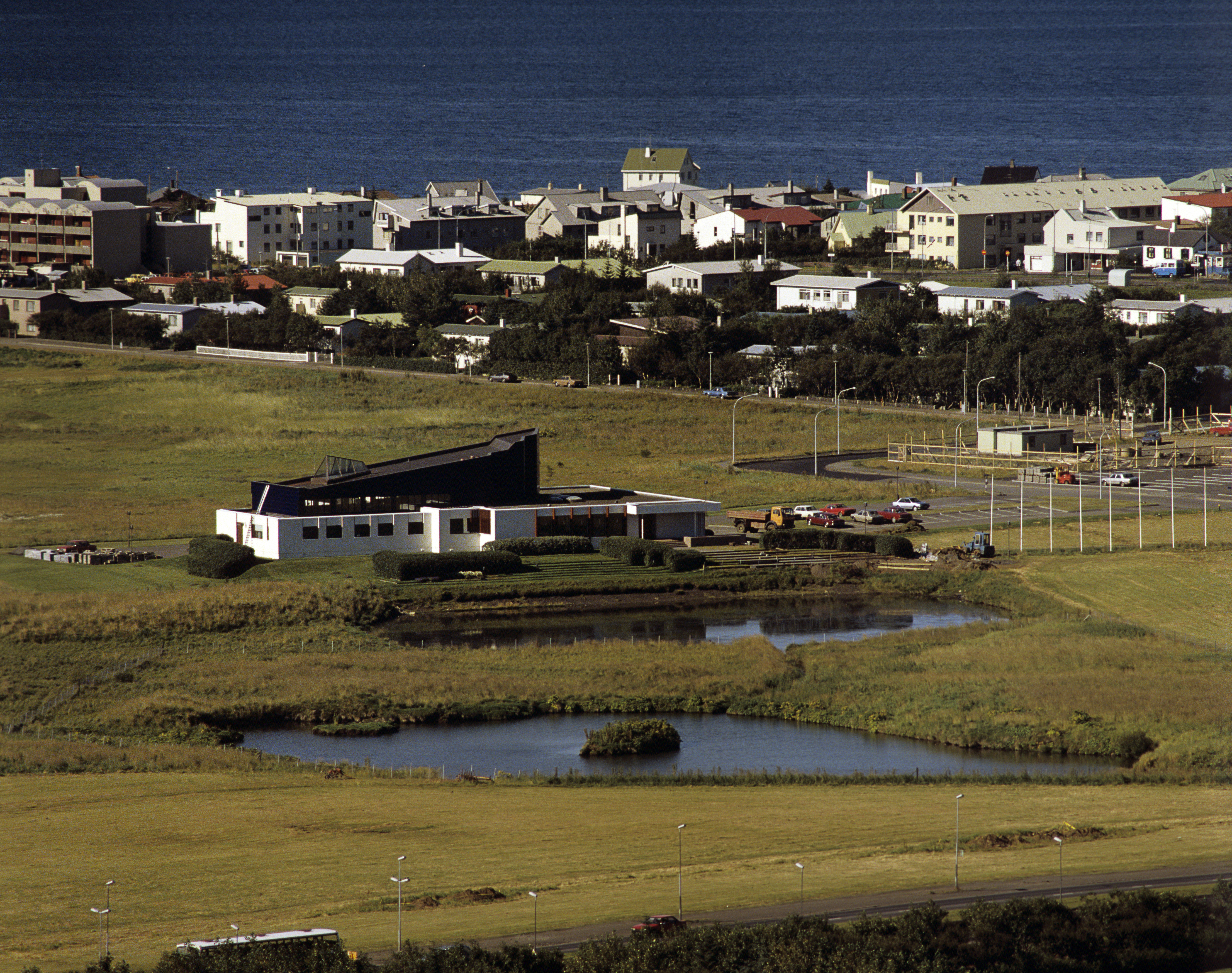 Reykjavík von der Hallgrímskirkja aus. Norræna húsið.